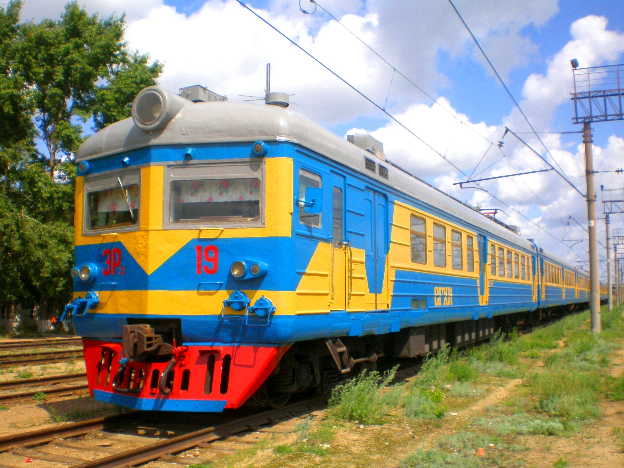 Электропоезд ЭР22-19 на станции Степногорск